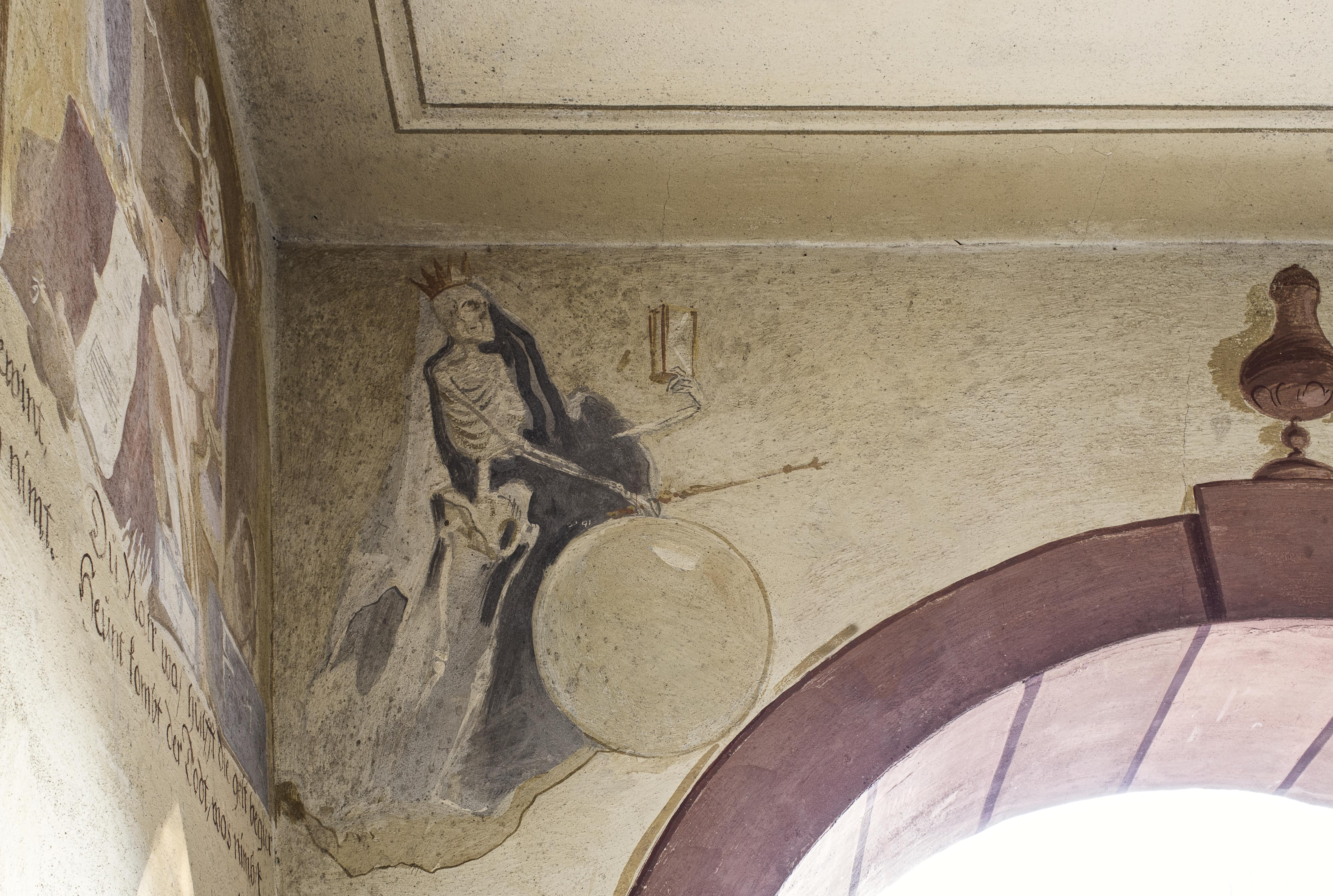 Der Totentanz in der Michaelskapelle auf dem Alten Friedhof in Freiburg im Breisgau nach der Restaurierung 2012 Die rechte Abschlußfigur